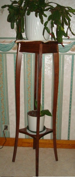 Sellette haute (20e siècle)